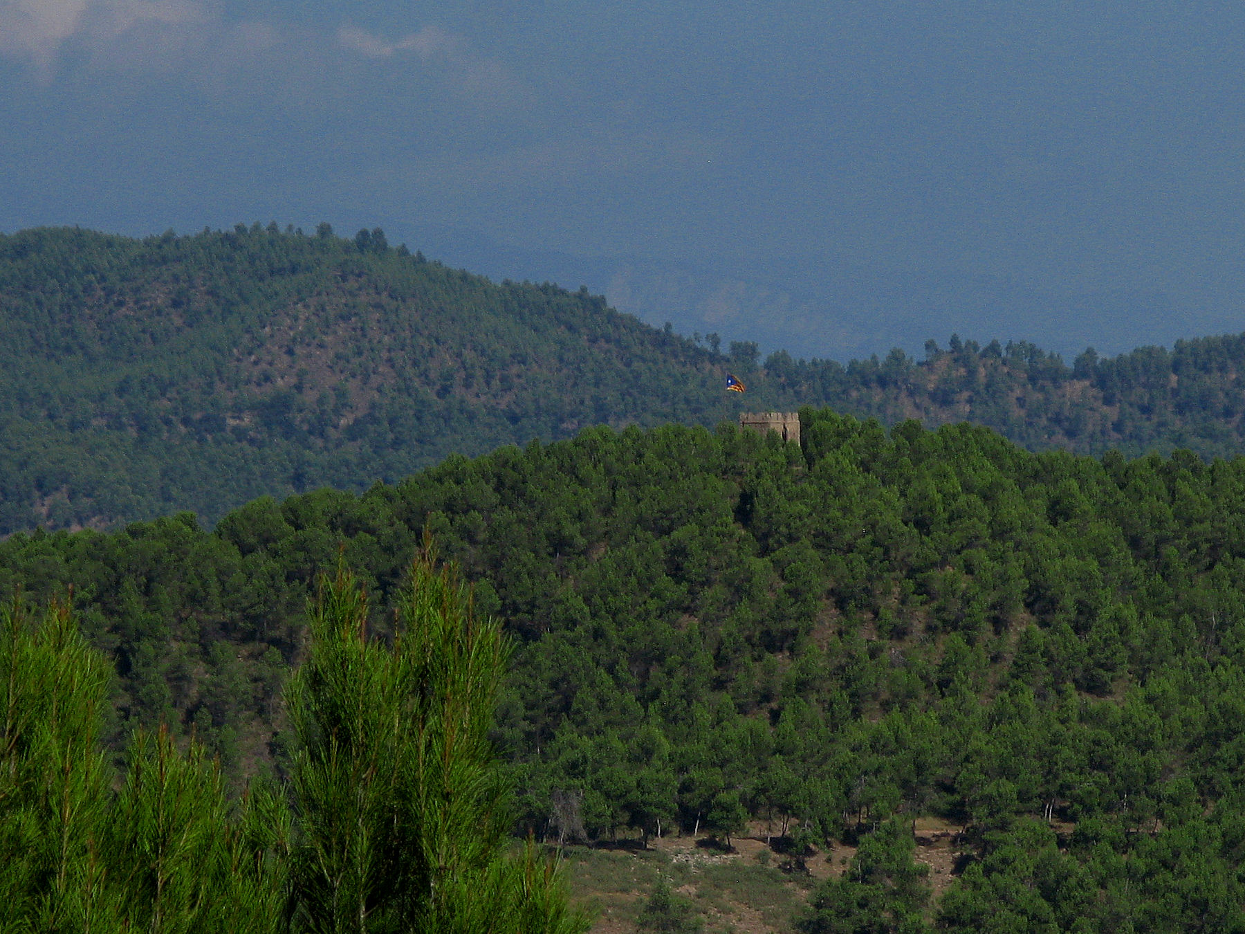 Torre del Soldat - Avinyó